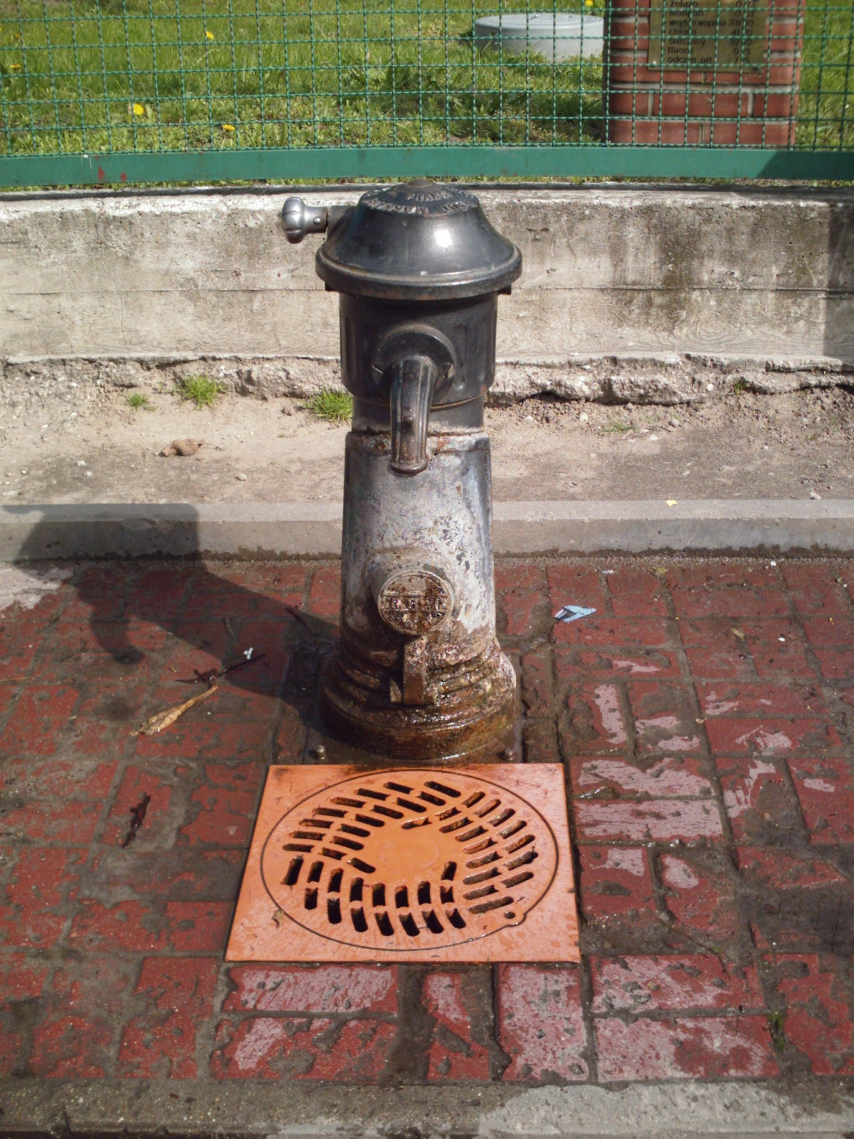 Publiczna studnia z bardzo dobrą wodą w Łodzi na Stokach przy ulicy Giewont.